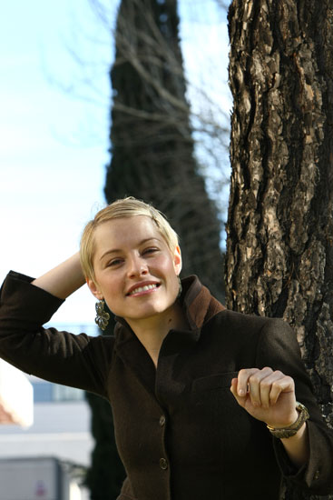 Soraya Arnelas